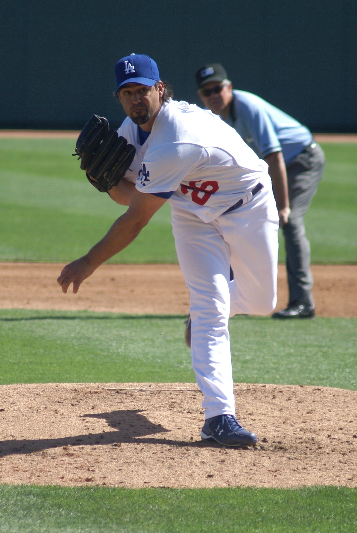 Eric Milton